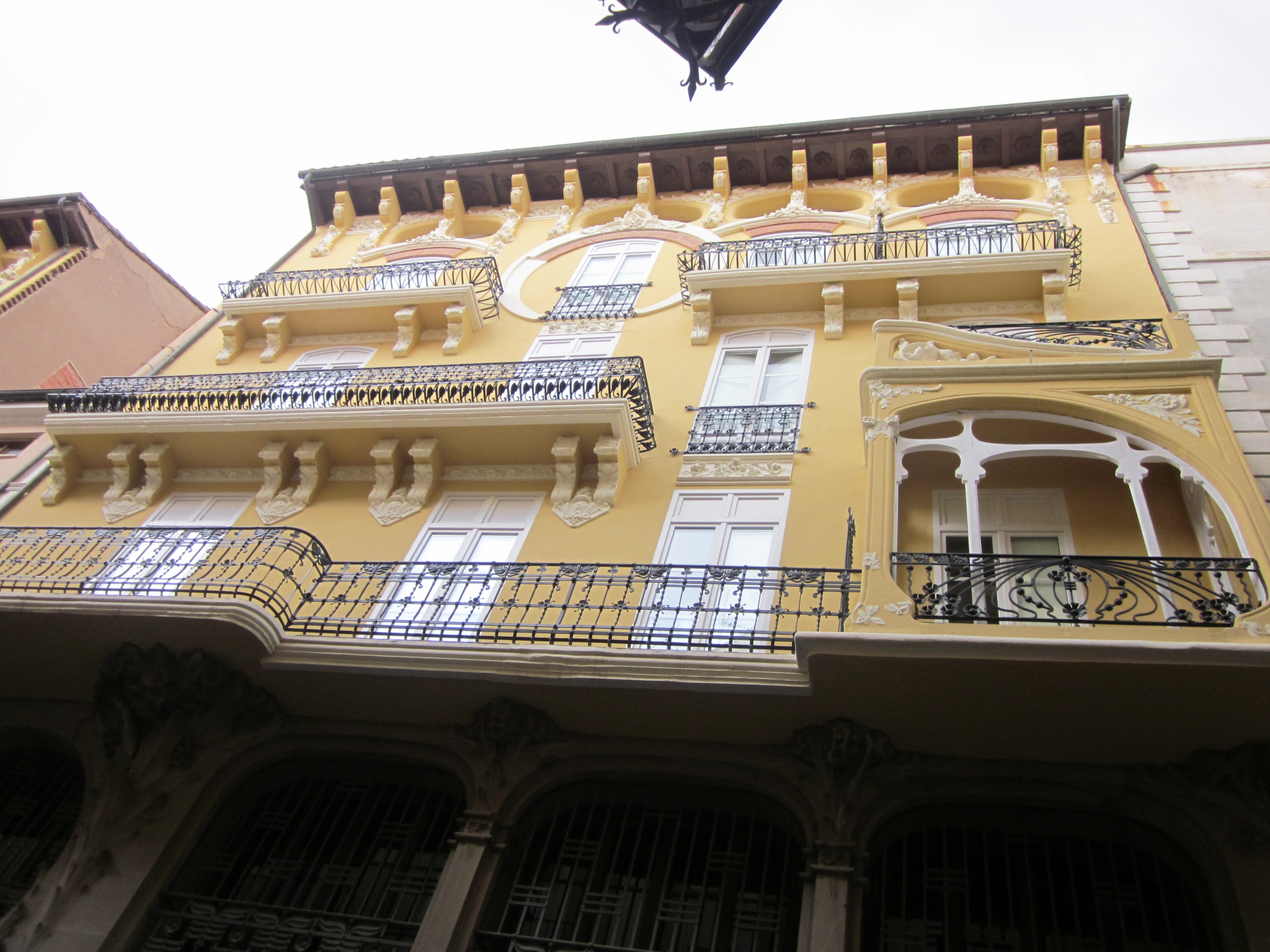 Casa Ferrán. Teruel, Aragón, España.